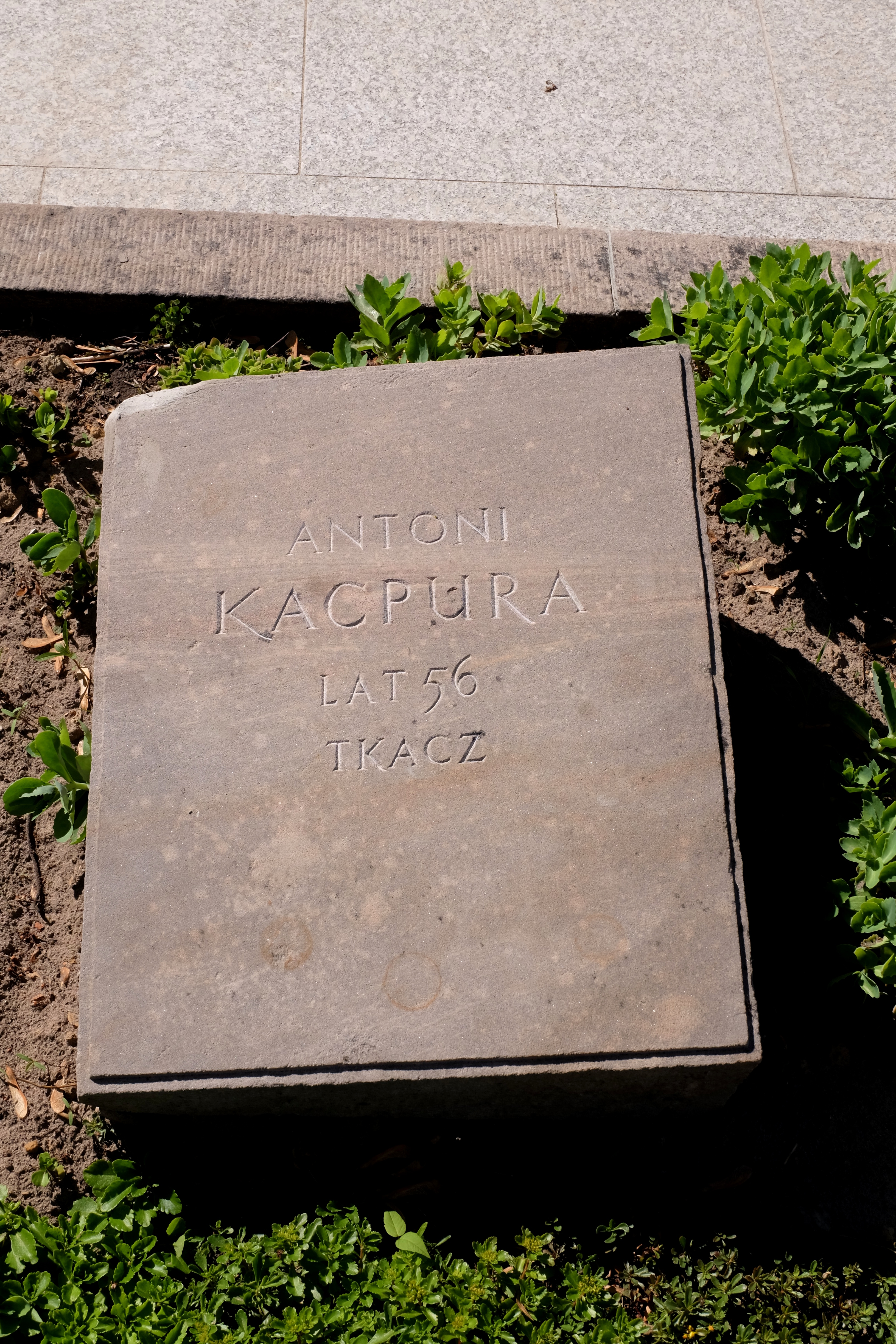 Grób działacza komunistycznego Antoniego Kacpury na Cmentarzu Wojskowym na Powązkach w Warszawie